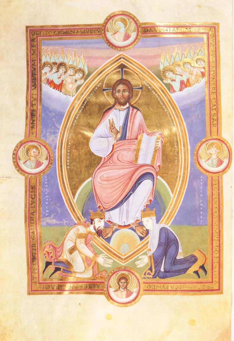 Konrad II. und seine Gemahlin Gisela knien vor der Majestas Domini, Codex Aures Escorialensis, um 1045/46. Madrid, Biblioteca del monasterio de San Lorenzo de El Escorial, Cod. Vitr. 17, fol. 2v